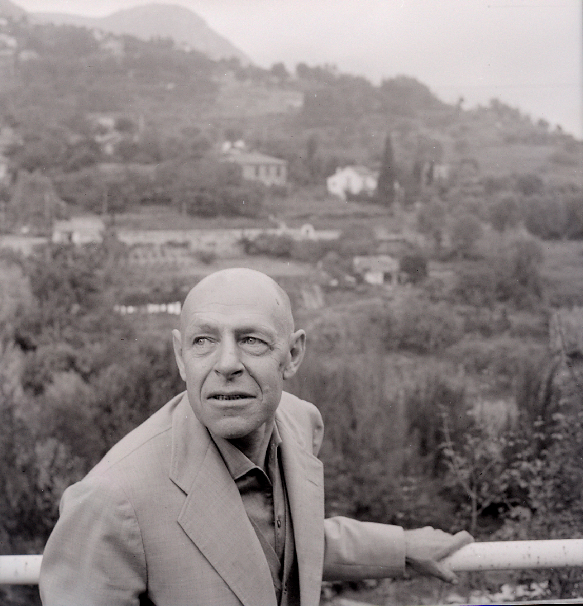 Servizio fotografico : Italia, 1965 / Paolo Monti. - Buste: 26, Fototipi: 27 : Negativo b/n, gelatina bromuro d'argento/ pellicola ; 6x6. - ((Serie costituita da 27 negativi identificati con i nn.: R14249-14275. Sulla busta del negativo R14249 manoscritto: "Dubuffet". La suddetta serie è contenuta nella scatola identificata con la numerazione R14207/R14356. Sul coperchio della scatola, manoscritto a pennarello: "Ritratti".